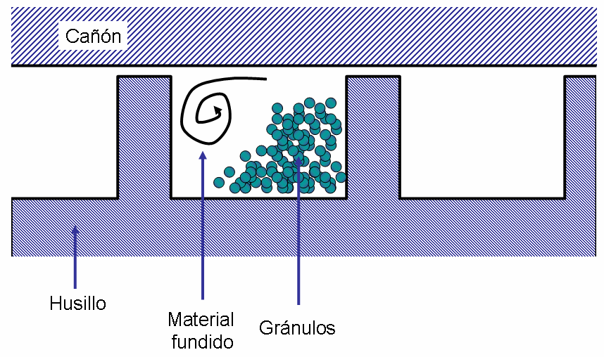 Mecanismo de fusión en el extrusor